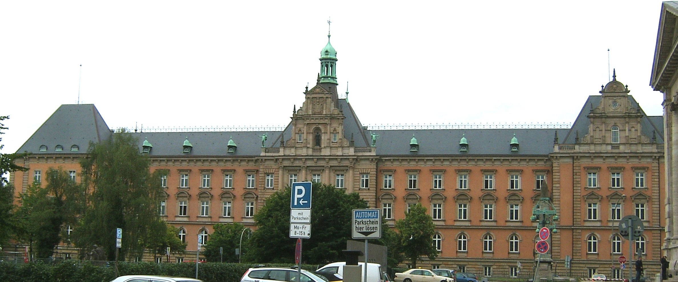 Das Ziviljustizgebäude am Sievekingplatz in der Hamburger Neustadt wurde 1879 - 1882 nach Plänen von Carl Johann Christian Zimmermann im Stil der deutschen Renaissance errichtet.